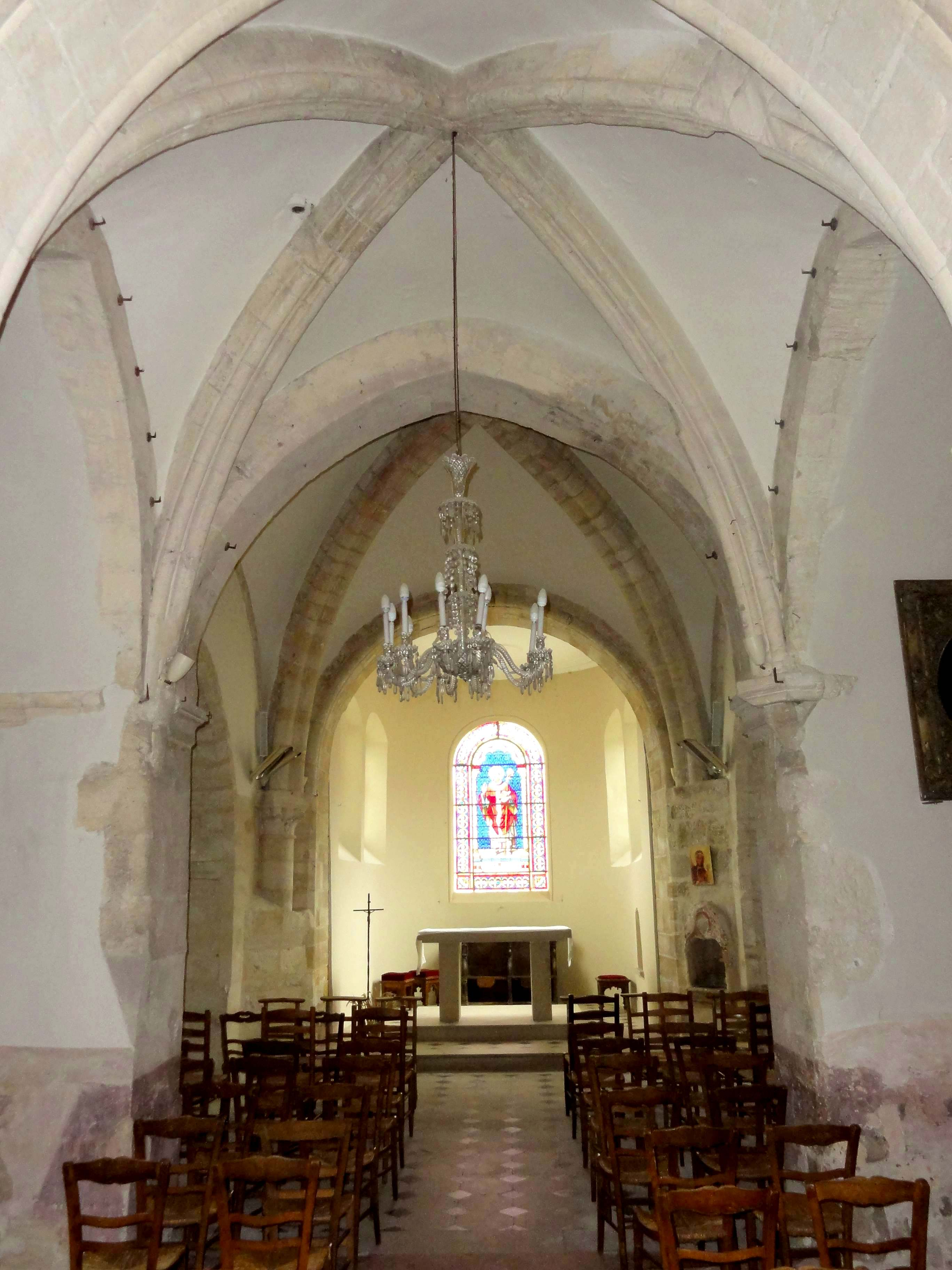 Intérieur de l'église (voir titre).